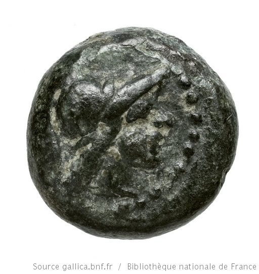 Εθνική Βιβλιοθήκη της Γαλλίας